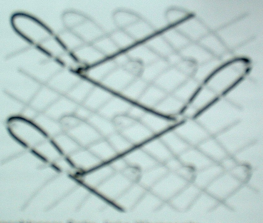 Schema der Maschenbindung: Offener Satin